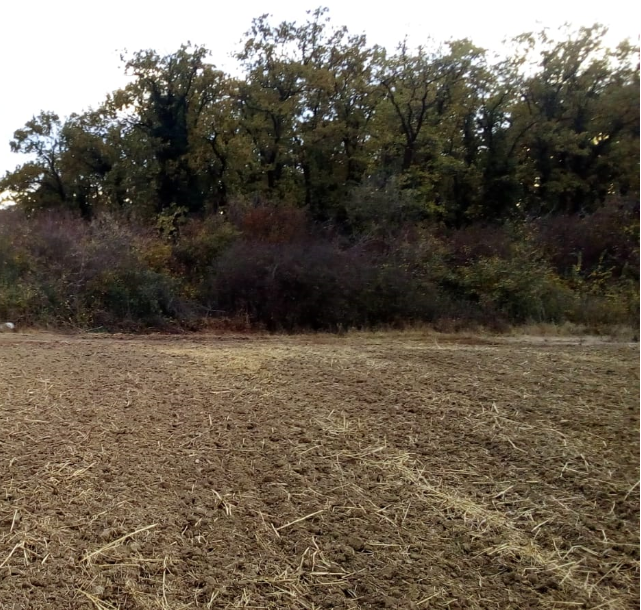 Шумска вегетација